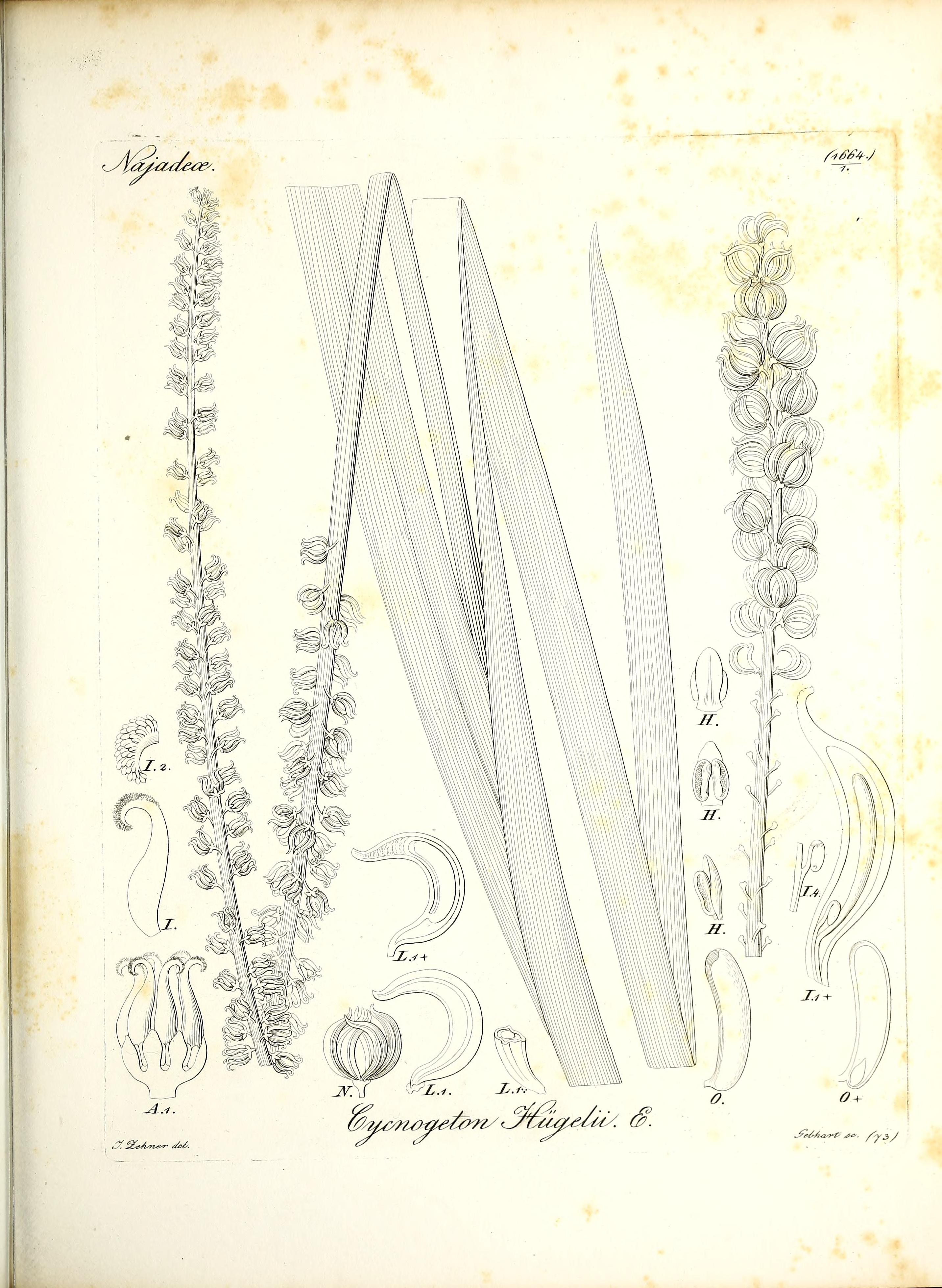 Iconographia generum plantarum.